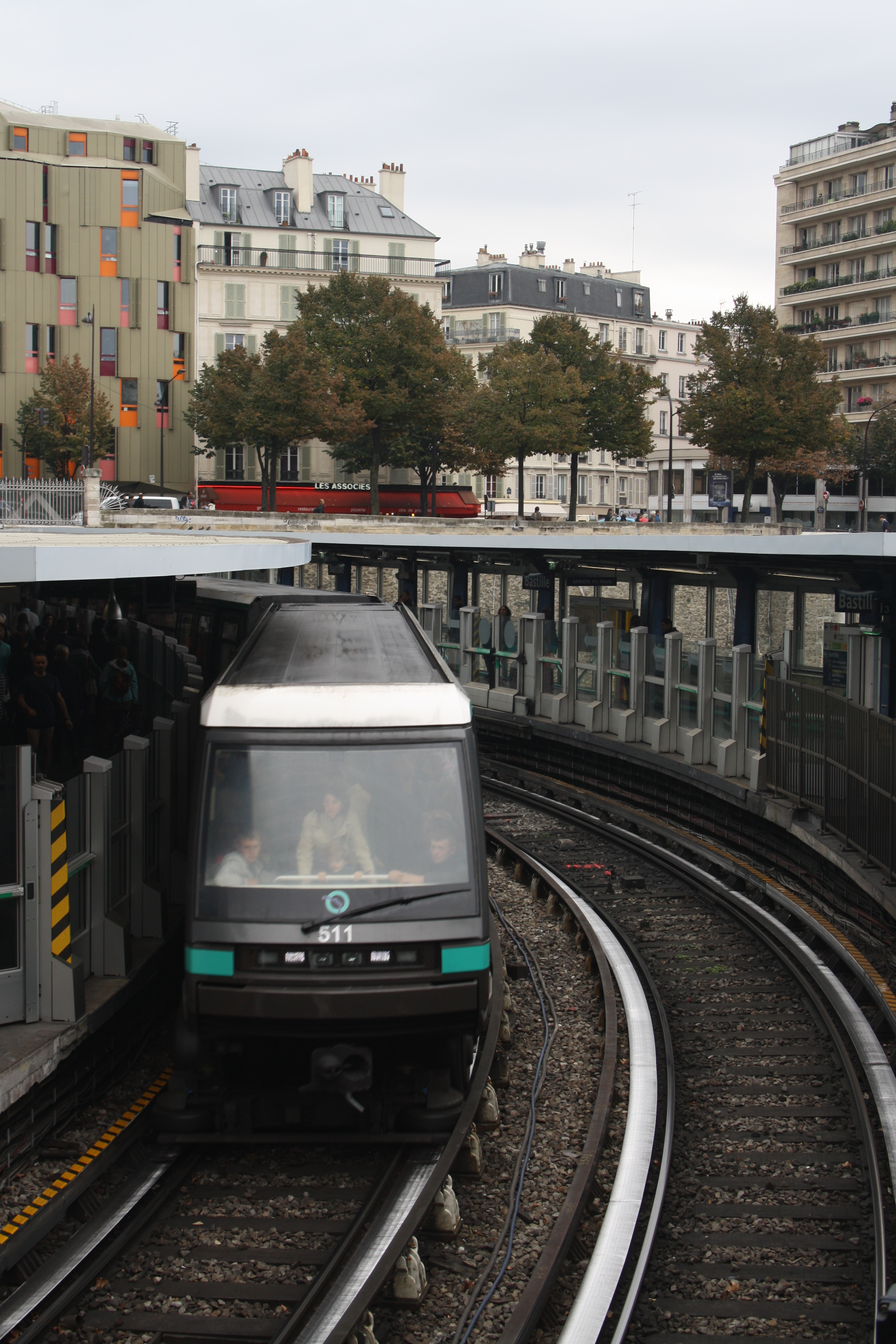 Bastille Métro Paris